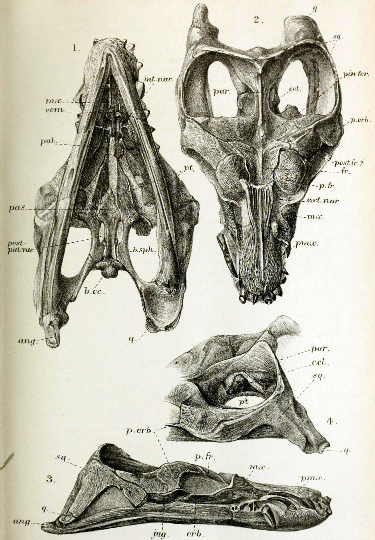 Skull of Anningasaura.